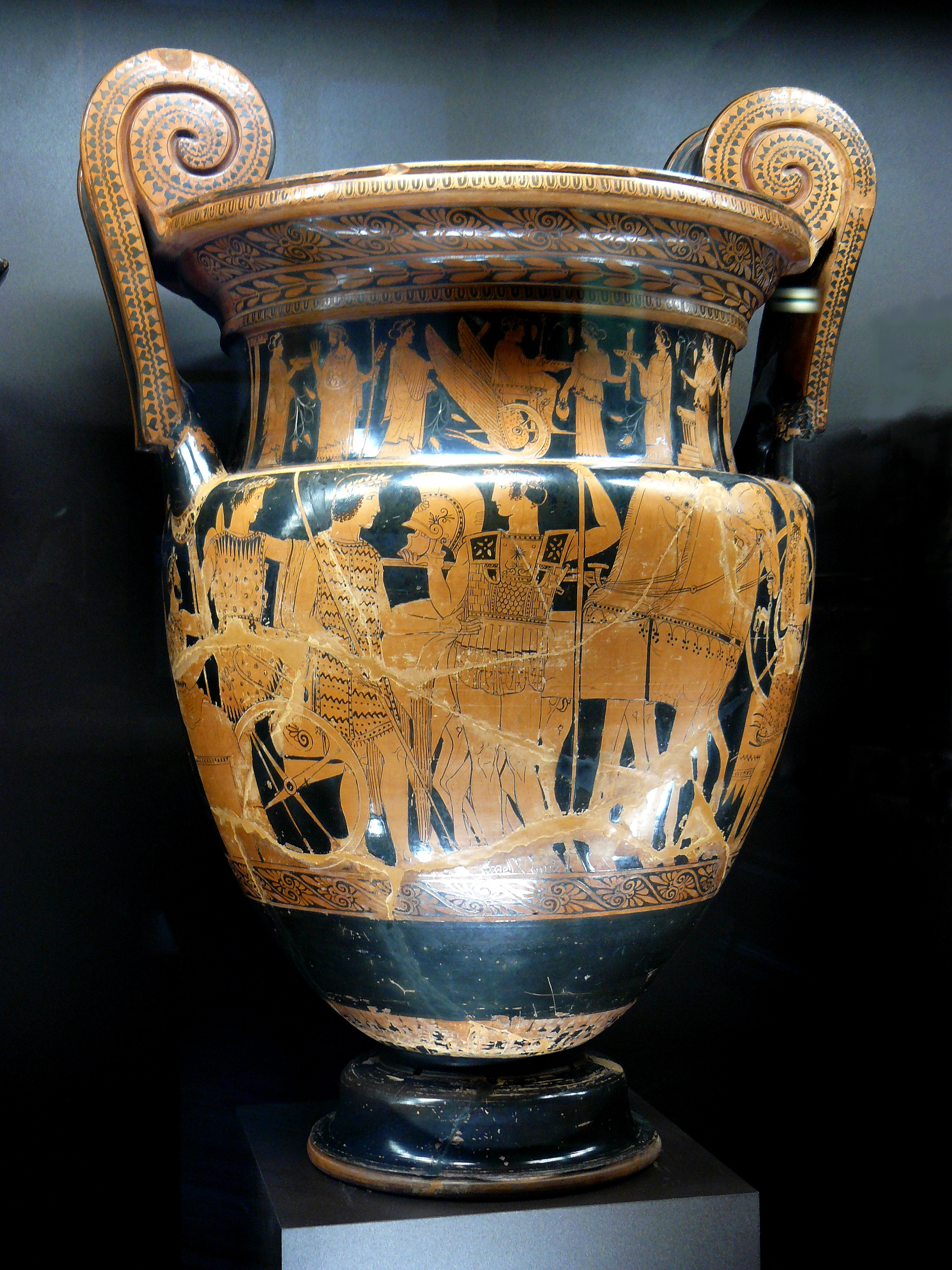 Cratère à volutes attribué au Peintre des Niobides - Technique à figures rouges, vers -460/-450, hauteur 83,6 cm. - décor : Départ de Triptolème, chasse à la biche, départ du guerrier, combat. - Musée du Louvre, Inv. n° G 343